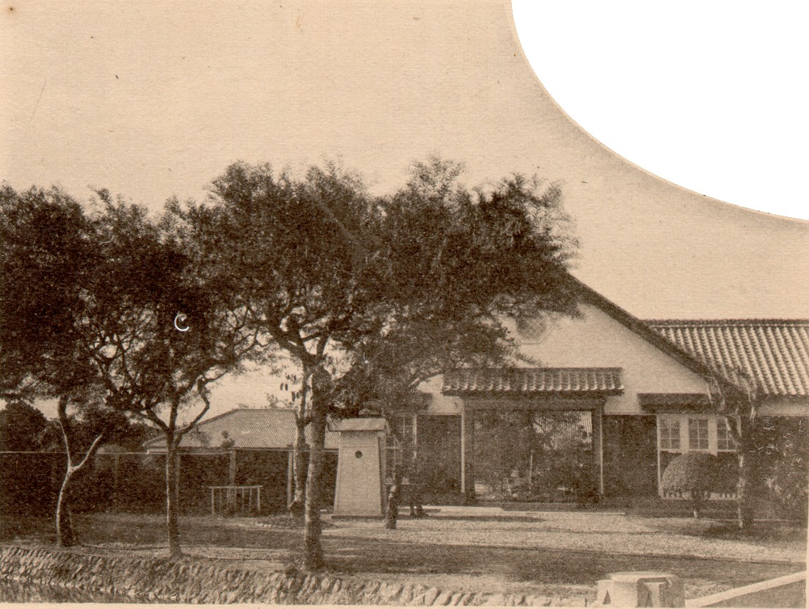 中文（台灣）: 宜蘭分屯中隊，原址為宜蘭酒廠東側空地